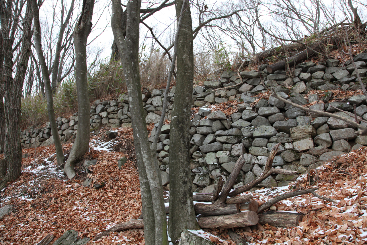 埴原城